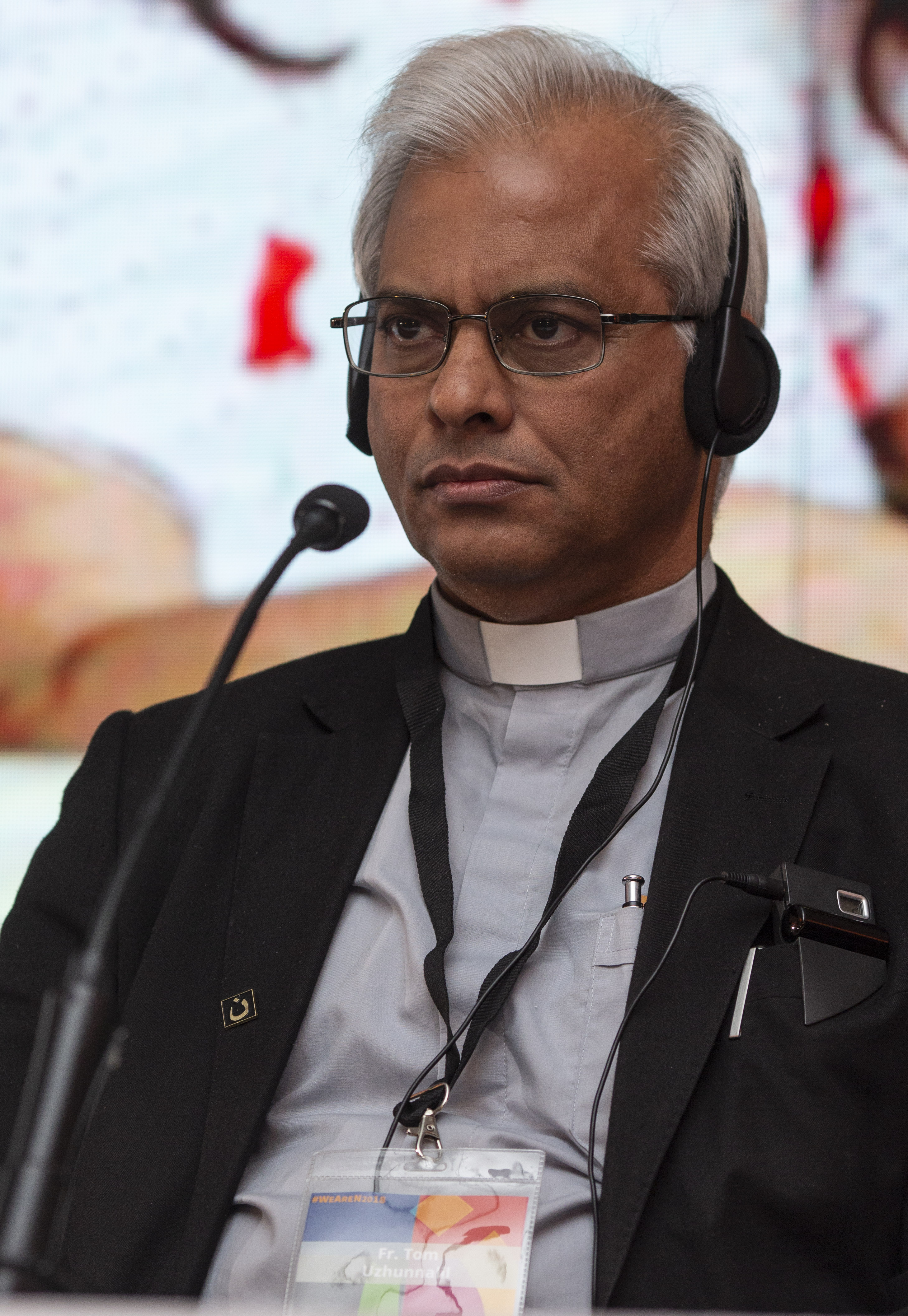 Los padres Tom Uzhunnalil y George Muttathuparambil han compartido su experiencia como religiosos en Yemen